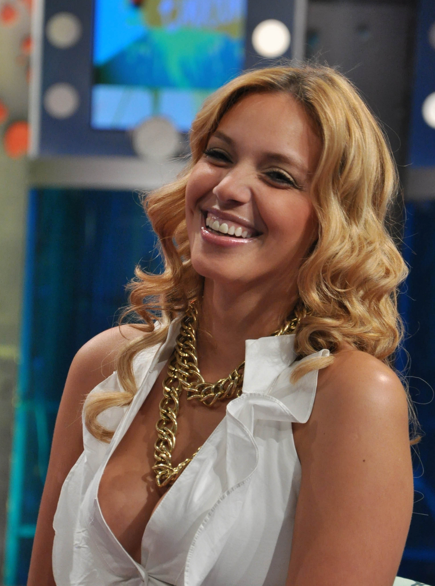 Actriz y locutora dominicana Hony Estrella en 2011.